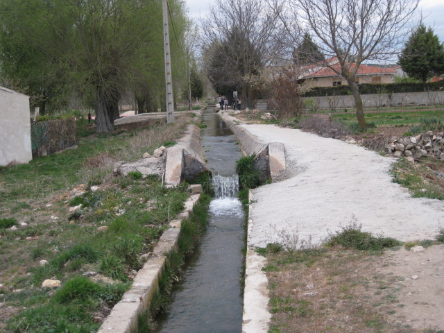 Canal de los Molinos, en Quintanarraya (Burgos)